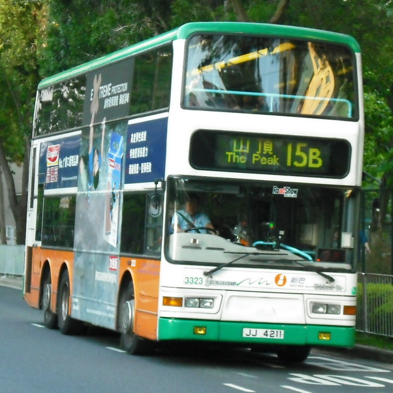 新巴15B線巴士於香港中央圖書館對出